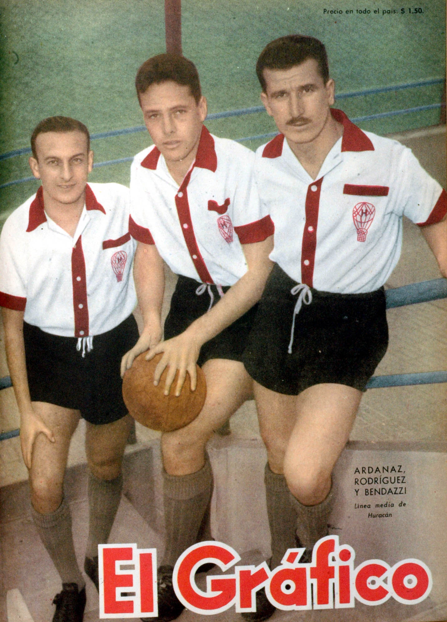 El Grafico del 11 de Junio de 1954. Edicion 1818